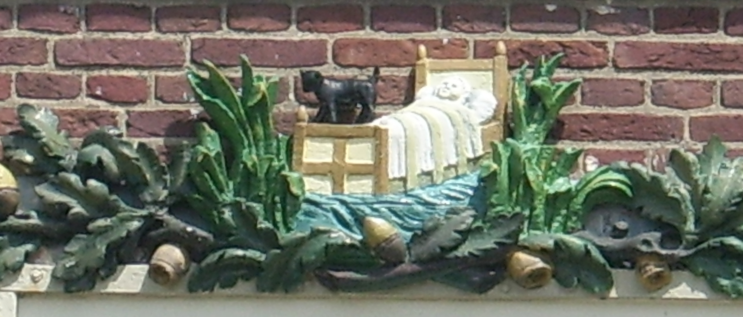 Gevelsteen op het Huis te Kinderdijk van het katje op de wieg. (Foto R.A. Koman, 2010)